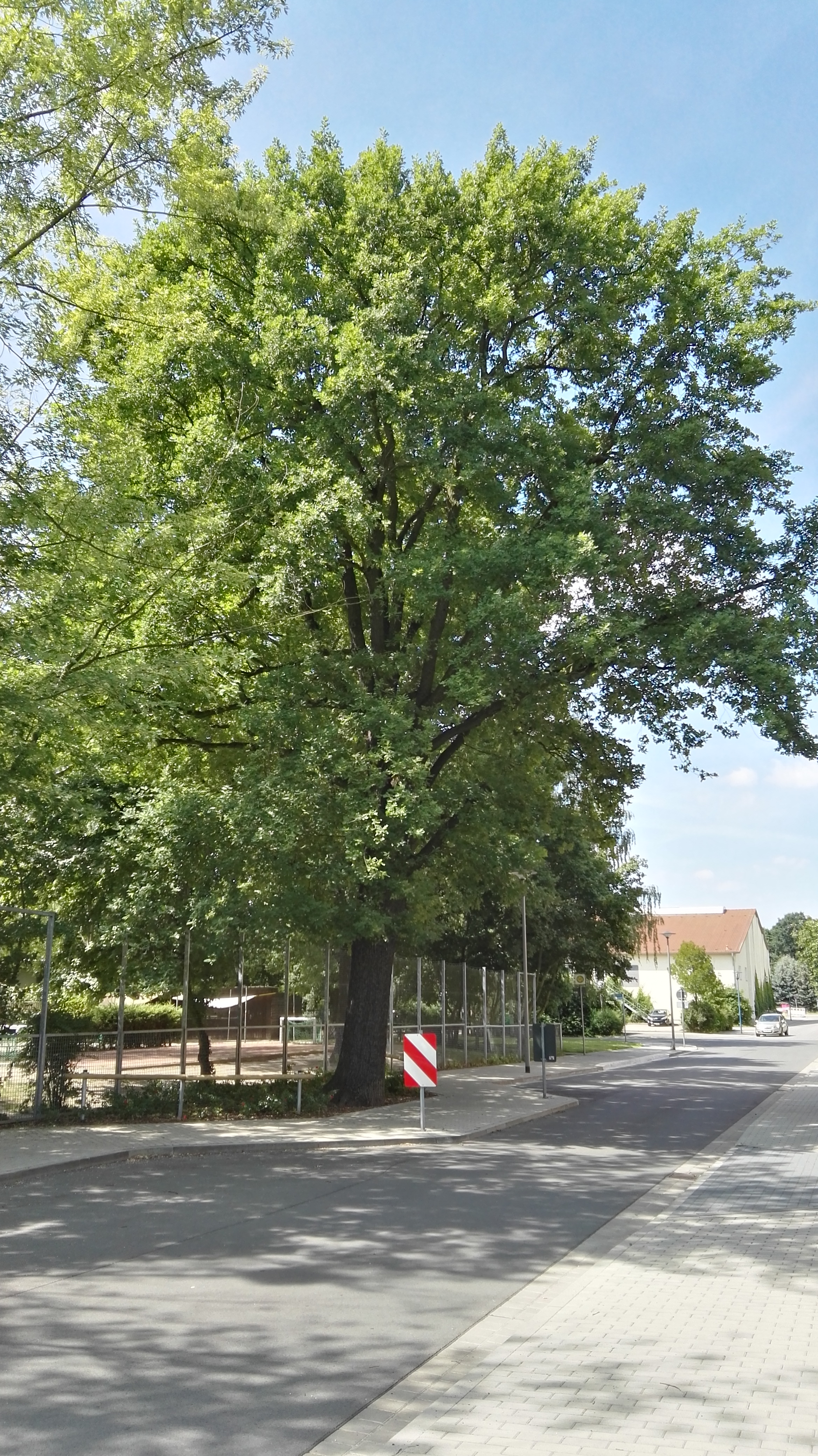 Naturdenkmal in Senftenberg Nr. 0100-5; Stieleiche (Quercus robur) außerhalb des Kindergartens Glück-Auf-Straße; Teil der Baumreihe aus Eichen 0100-5 bis 0100-9